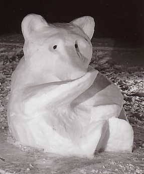 Snöbjörn Foto: Användare: Comet27